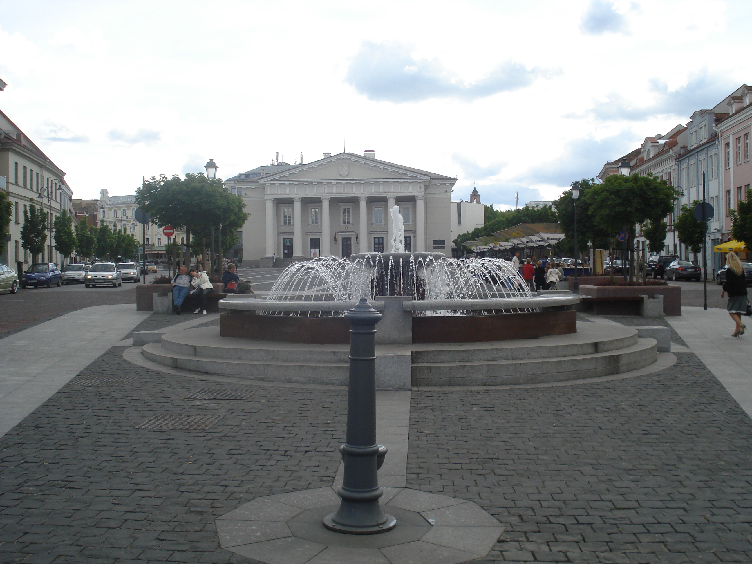 Town hall square in Vilnius after renovation. Rekonstruota Vilniaus Rotušės aikštė